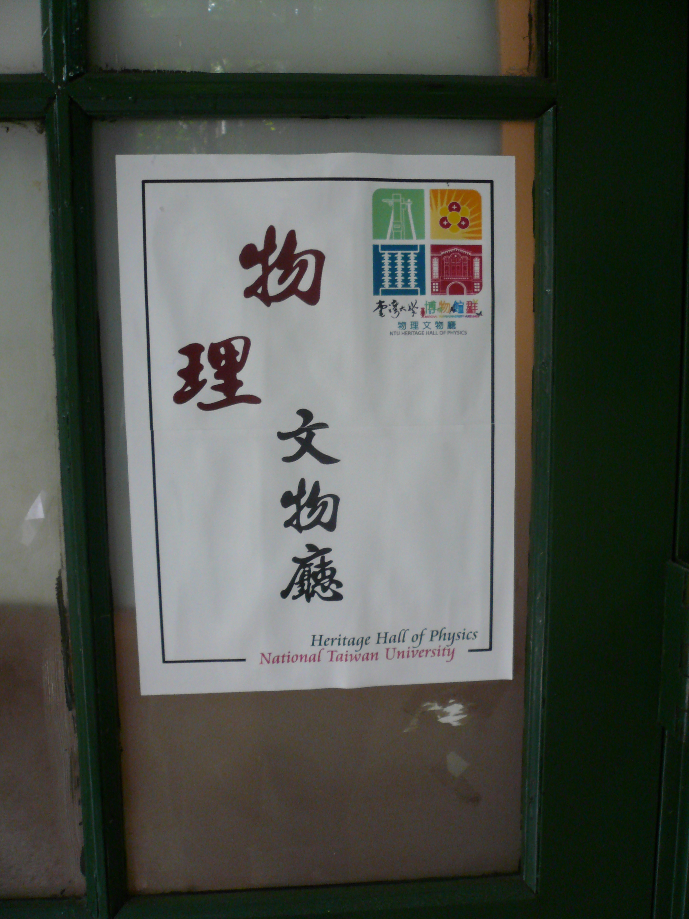 中文（台灣）: 物理文物廳展覽廳門